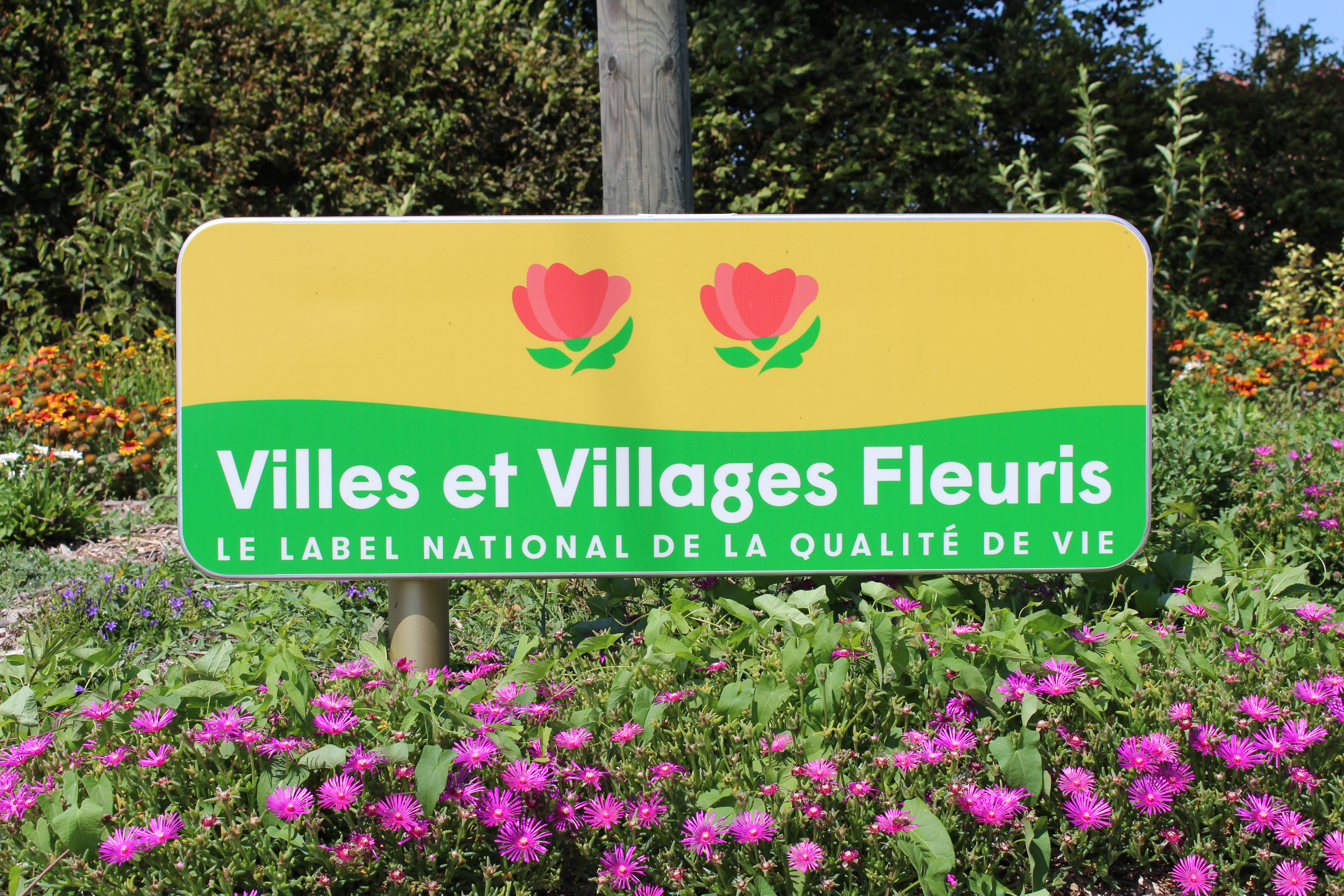 Panneau "Villes et Villages Fleuris" avec deux fleurs à Crottet.